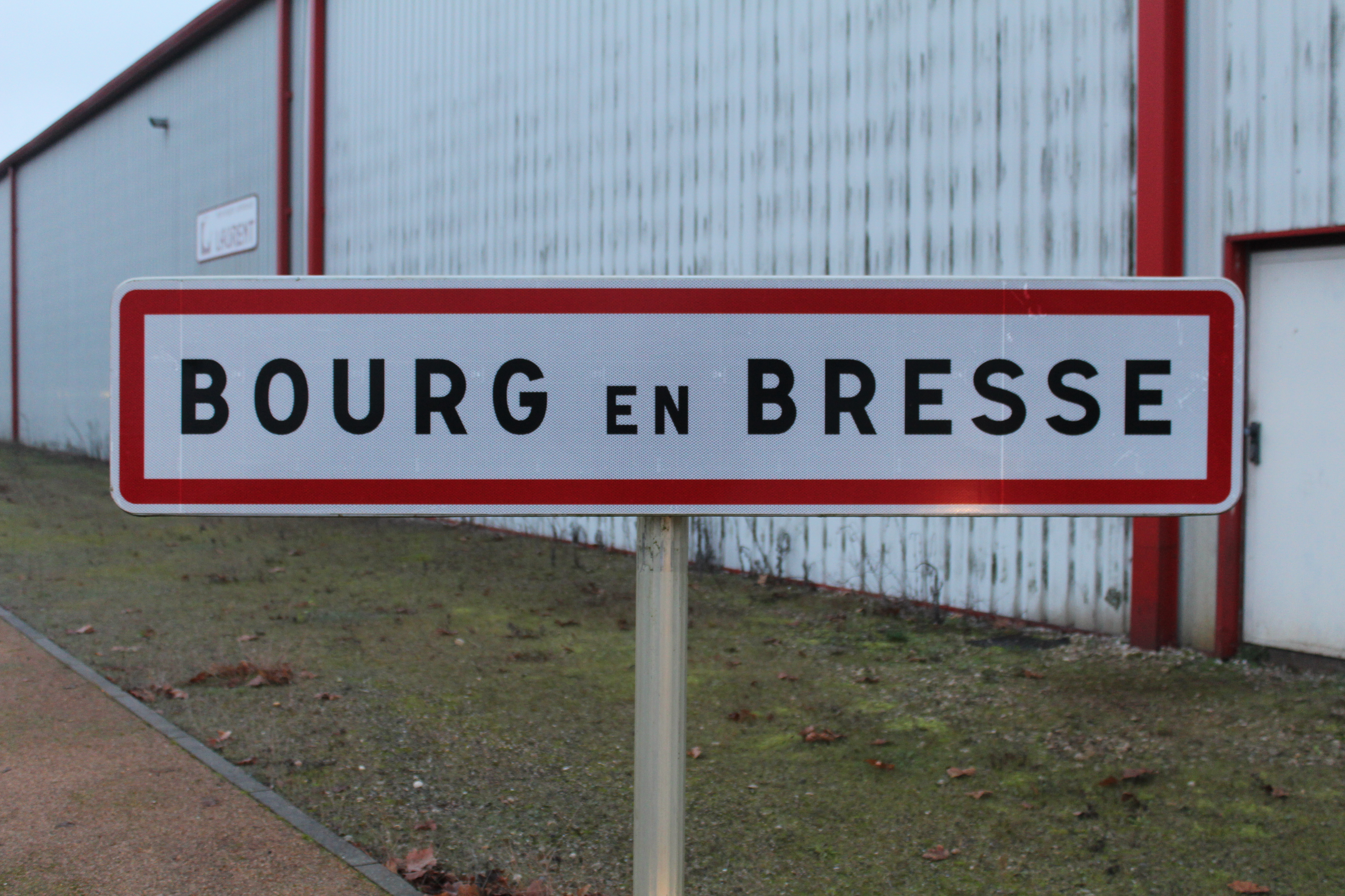 Panneau d'entrée dans Bourg-en-Bresse vers Cenord.